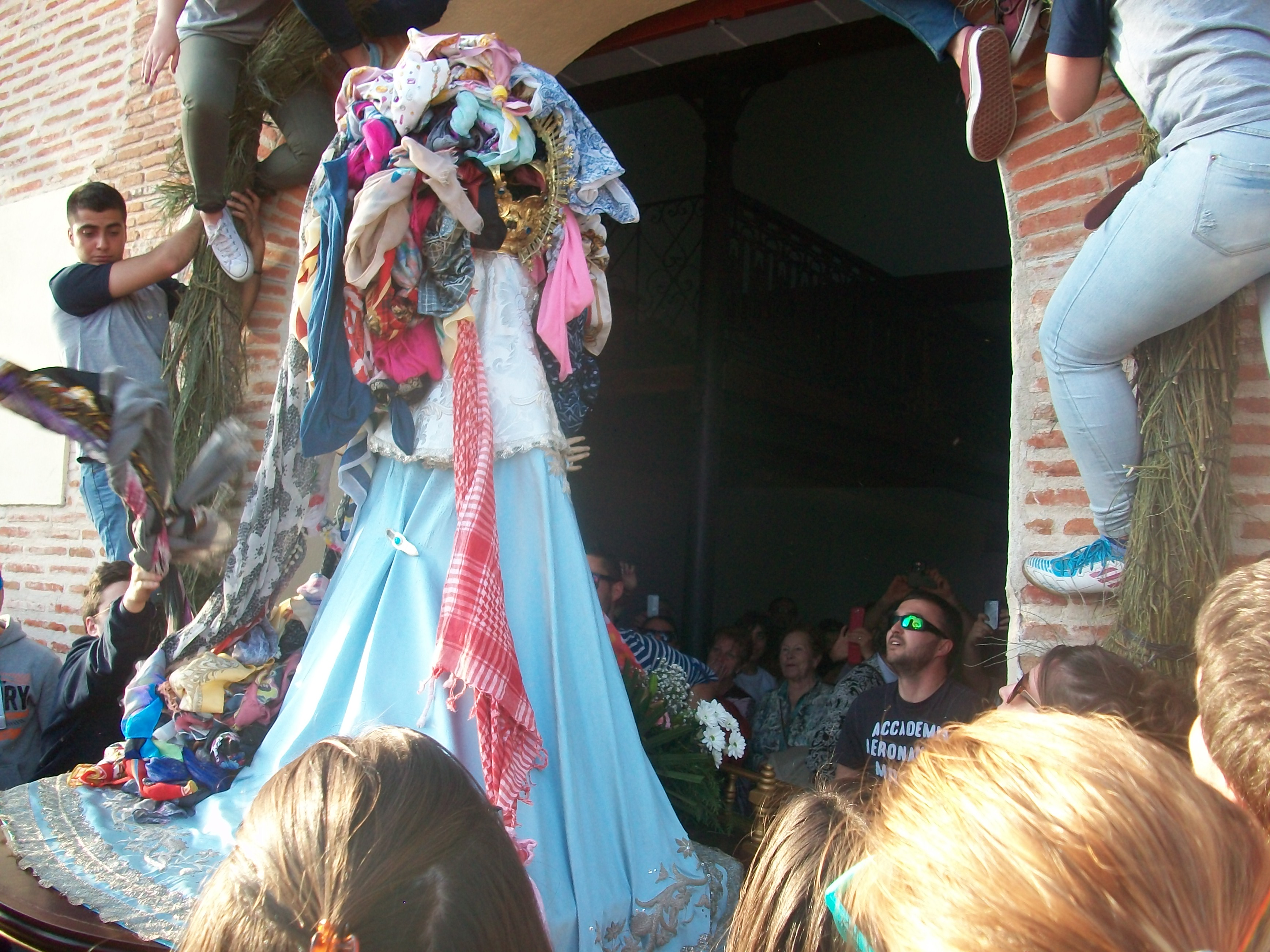 Los quintos echan sobre la corona de la virgen los pañuelos que han recogido con antelación a las mozas del pueblo